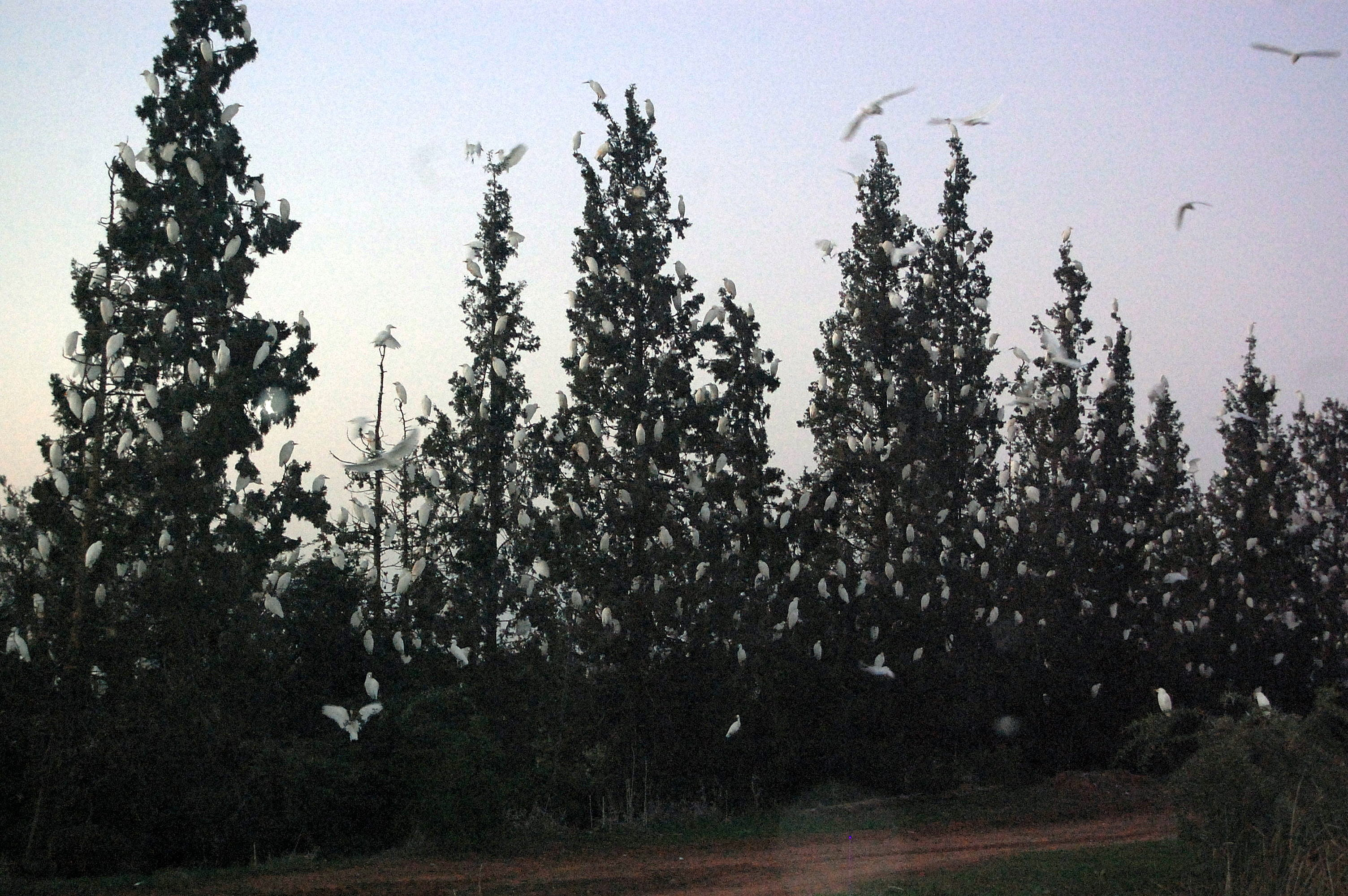 Walon: Djocoe d' oujheas ås vatches so des ciprès did lon